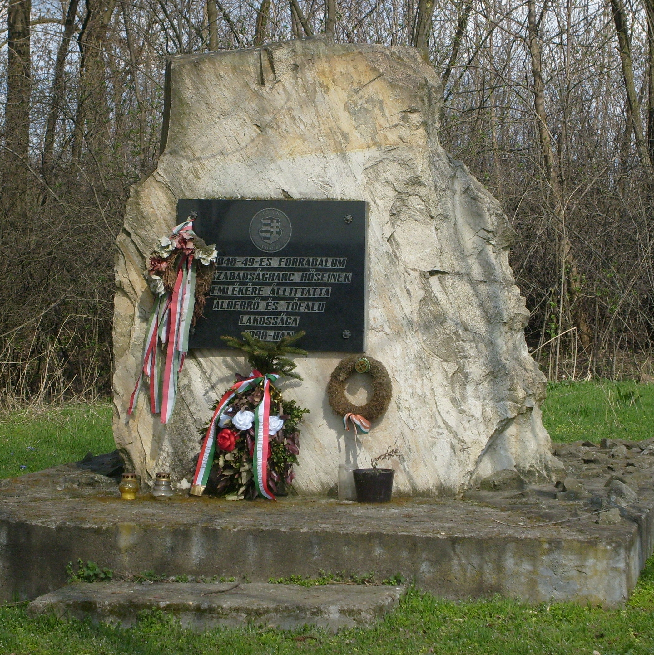 Honvédhalmi kiskút, Tófalu